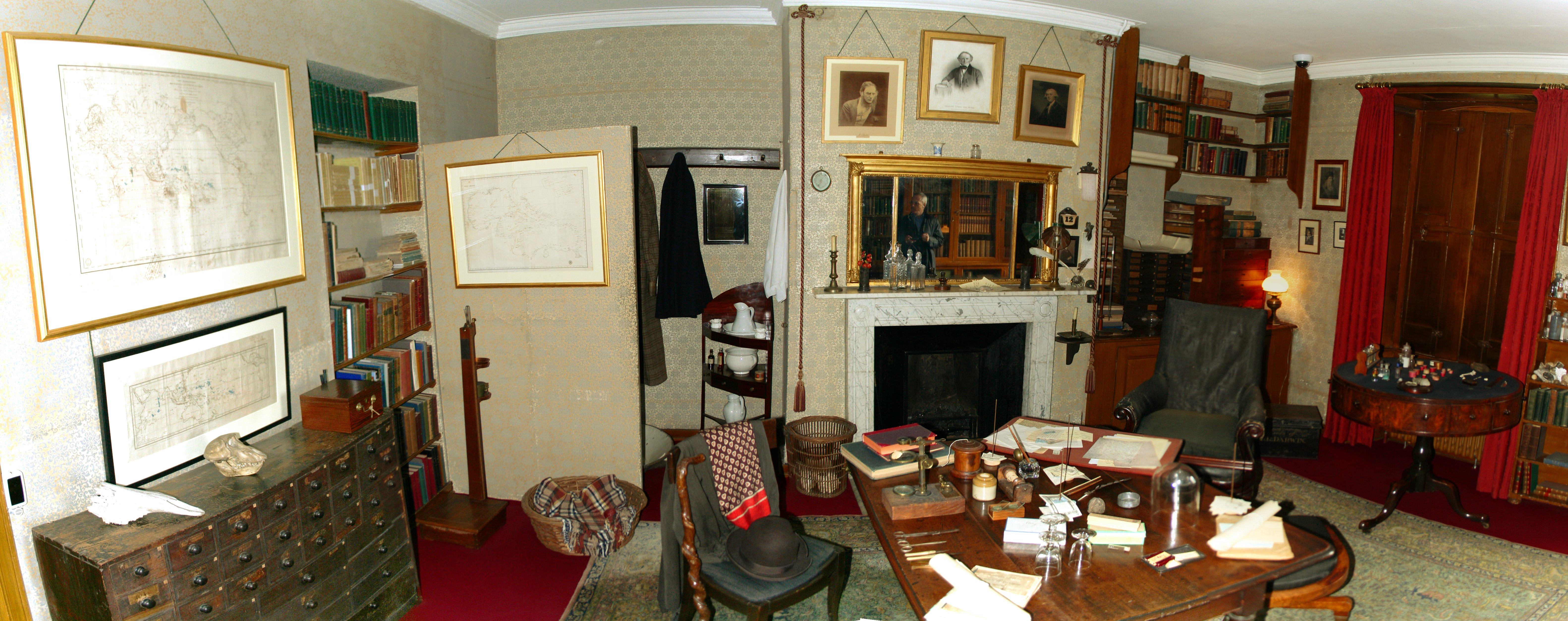 Salón de la casa Down House donde residió durante 40 años el naturalista Charles Darwin, y donde escribió su célebre obra El Origen de las Especies.